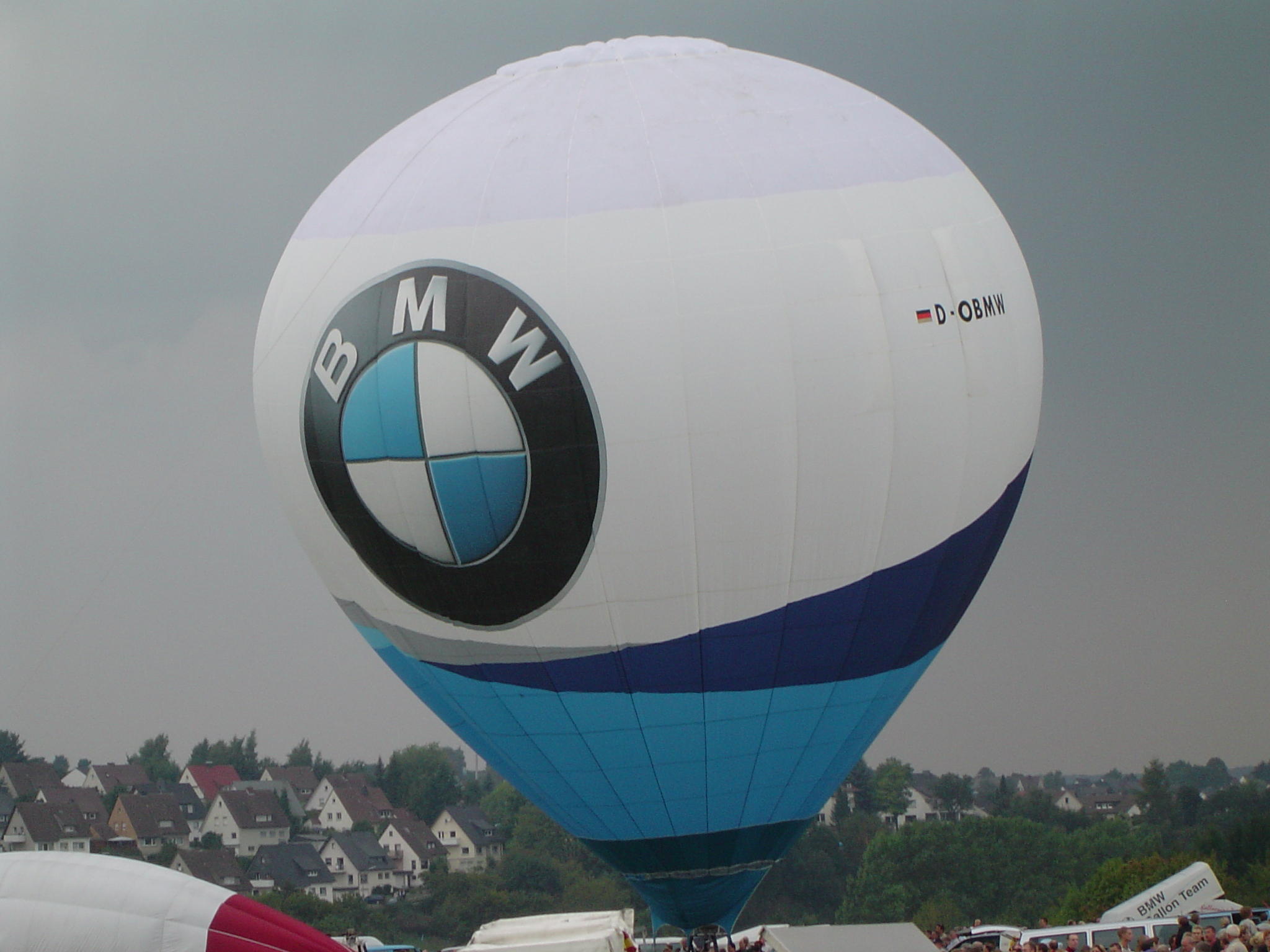 Warsteiner Internationale Montgolfiade